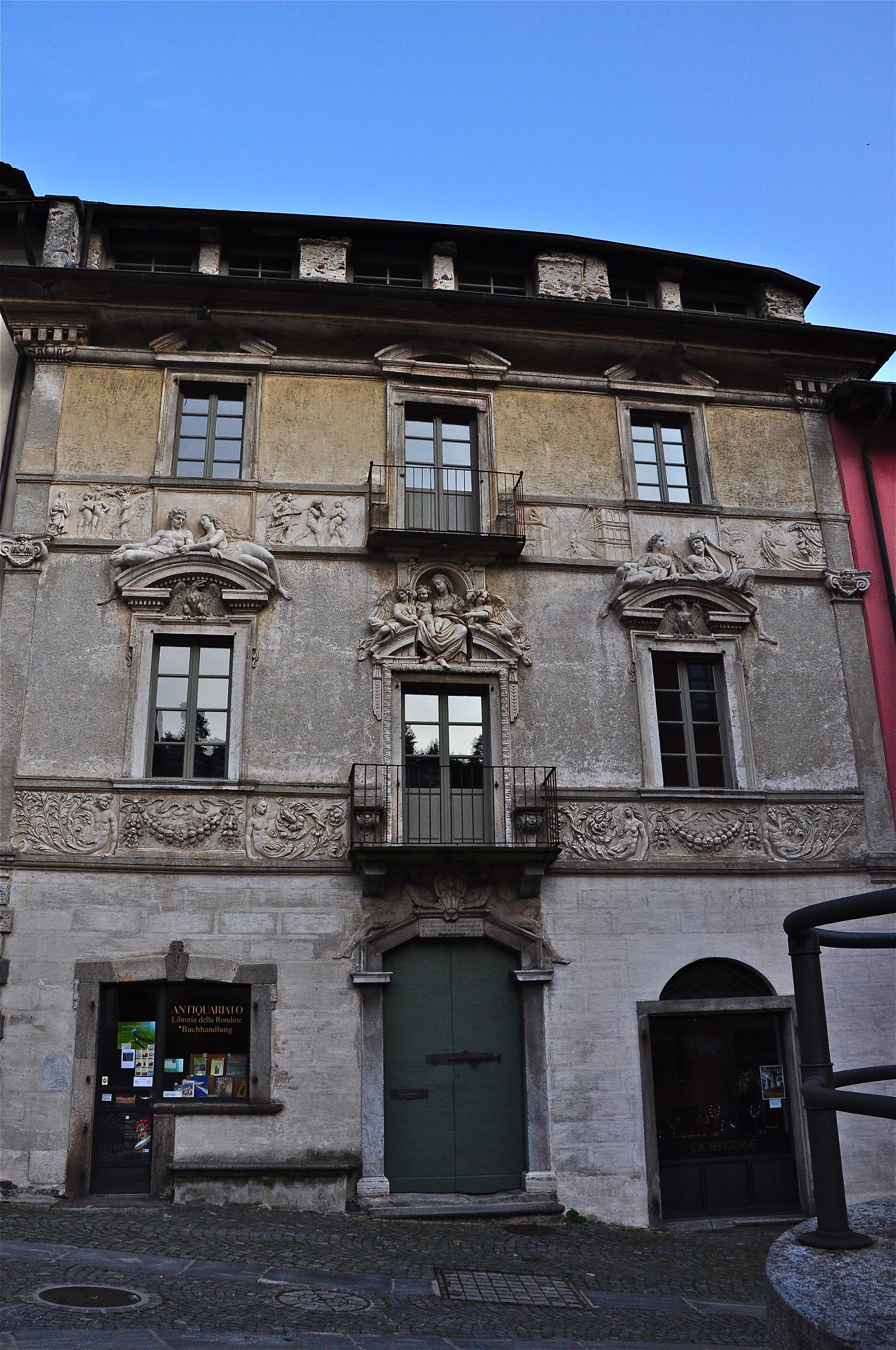 Facciata